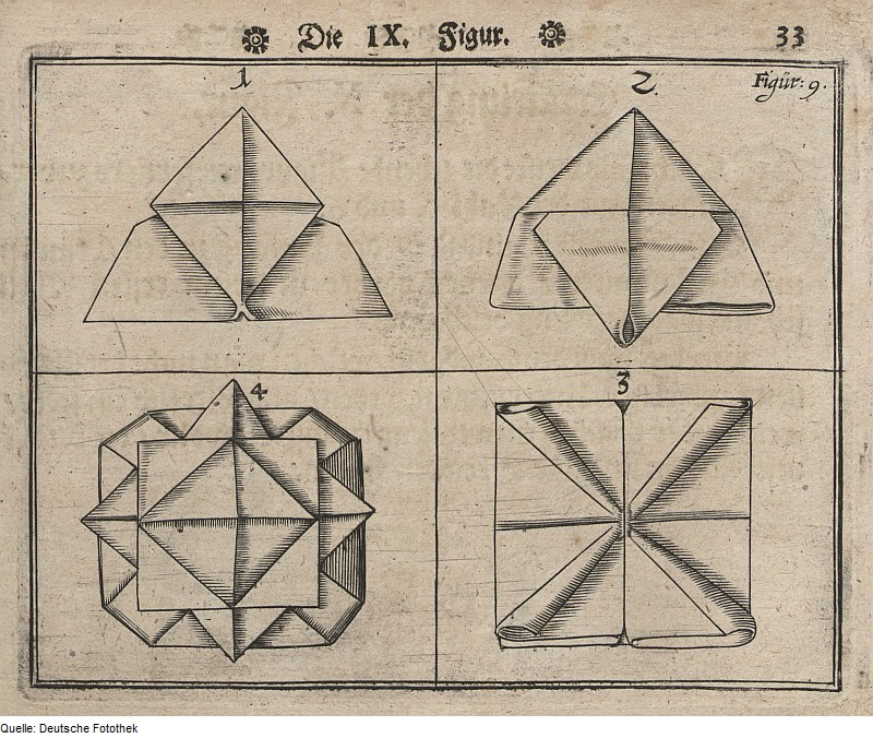 Original image description from the Deutsche Fotothek Gastronomie & Esskultur & Tischsitte & ServietteTechnik des Serviettenfaltens - Die IX. Figur